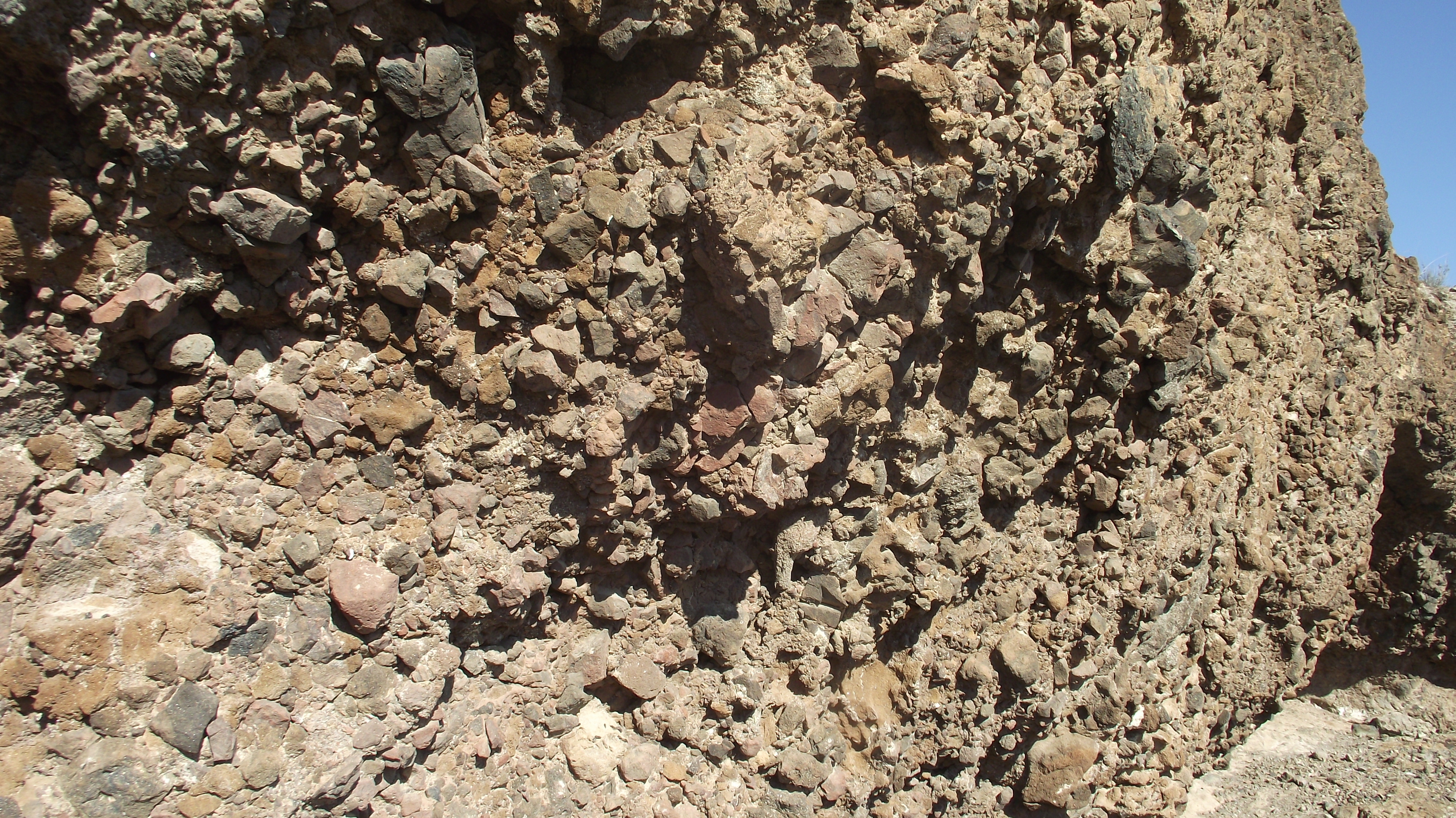 Vista donde se aprecia la morfología de una roca del volcán de Barqueros - Murcia - España